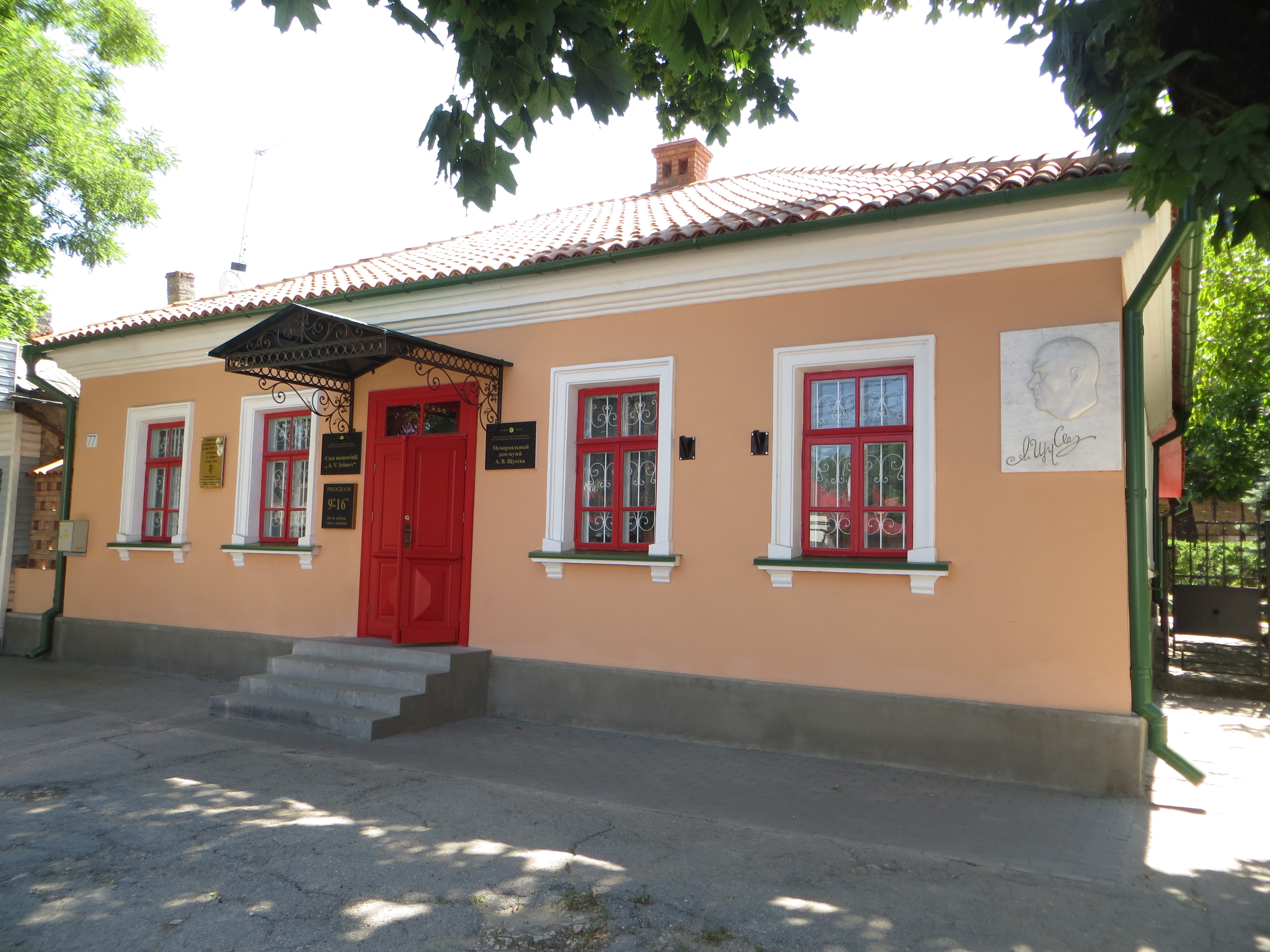 Дом Щусева в Кишиневе